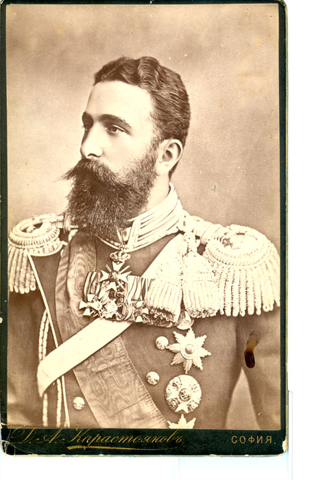 Княз Александър Батенберг.